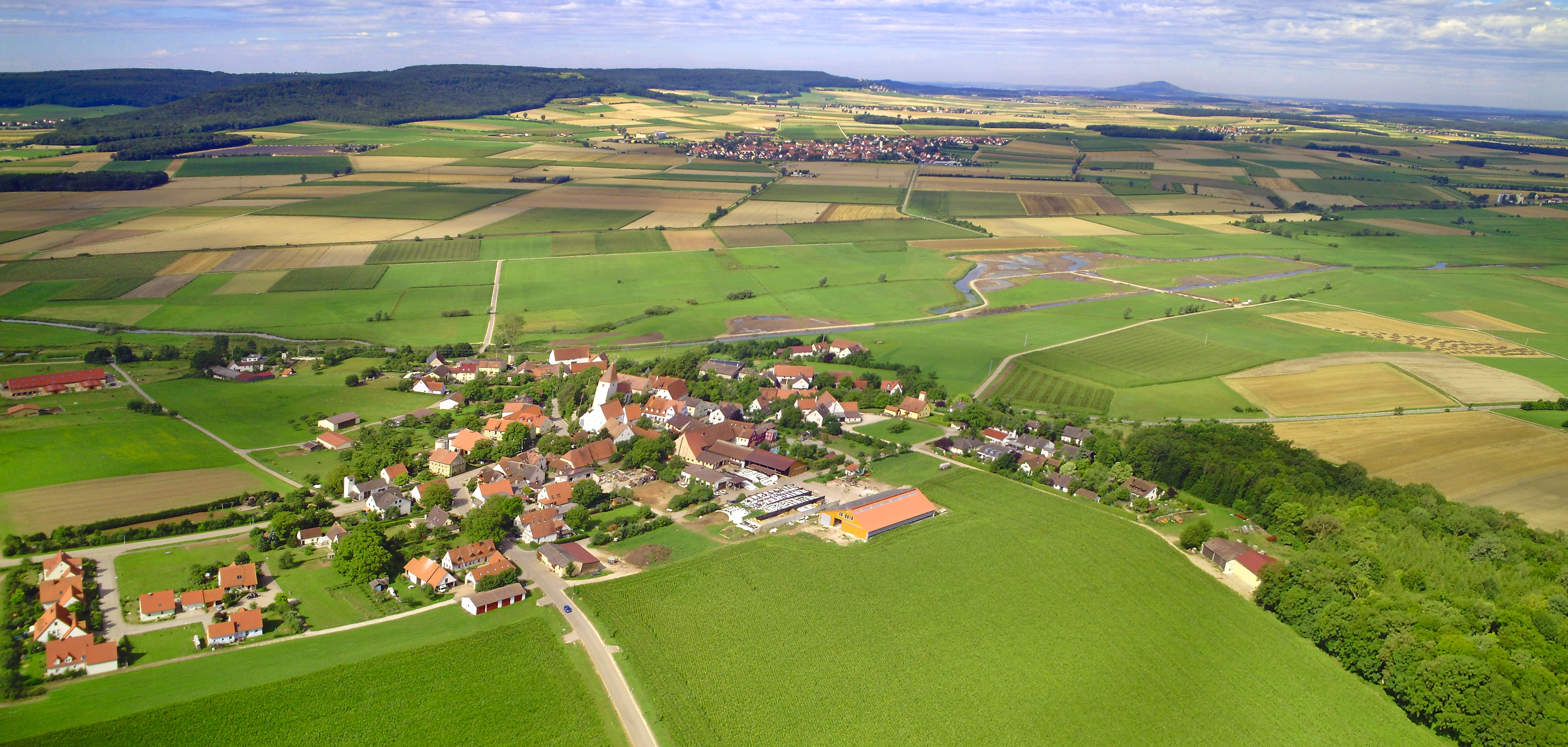 Aufgenommen mit einem Modellflugzeug, das Bild ist zusammengesetzt aus 5 Einzelaufnahmen